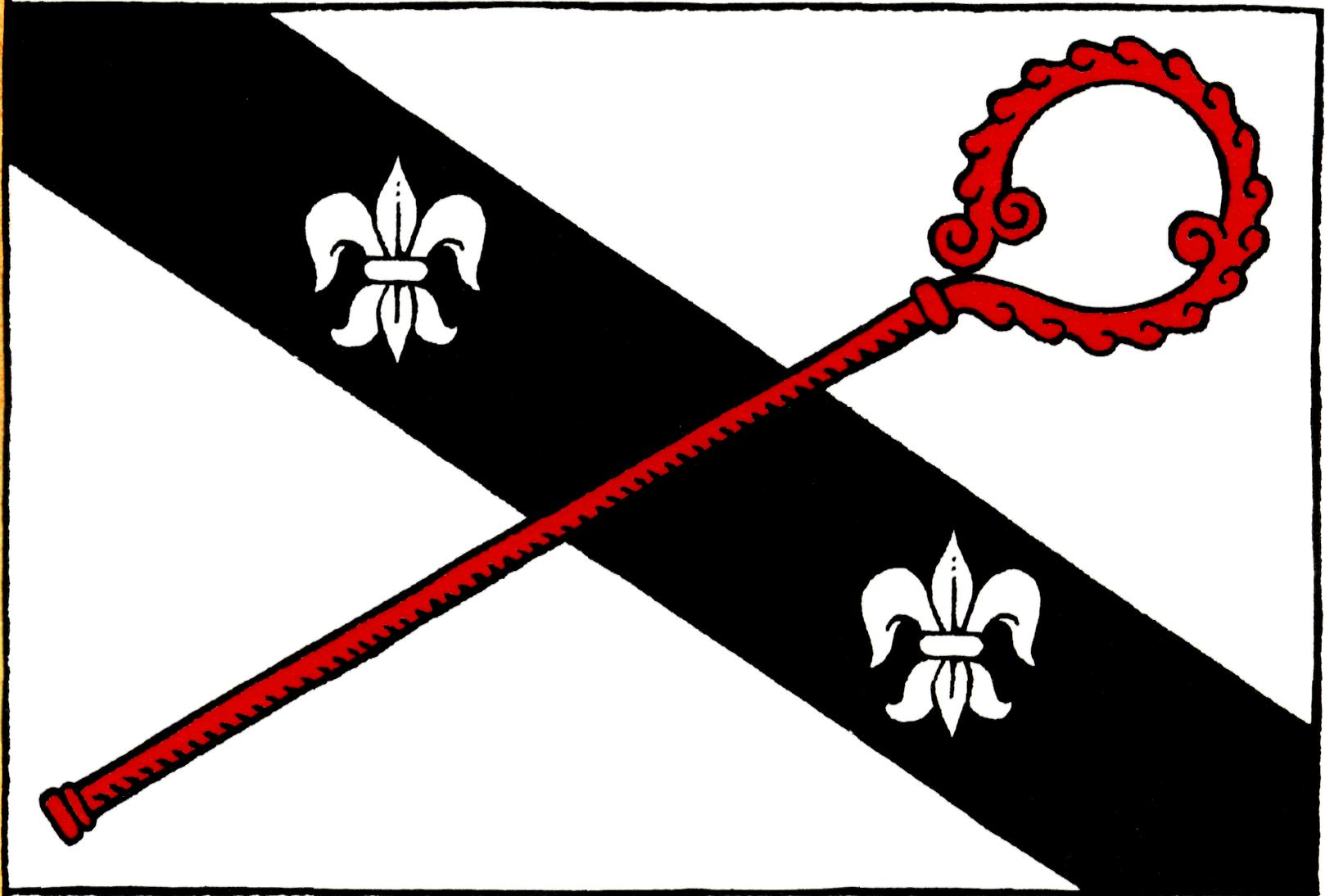 Vlajka obce Opatovice I